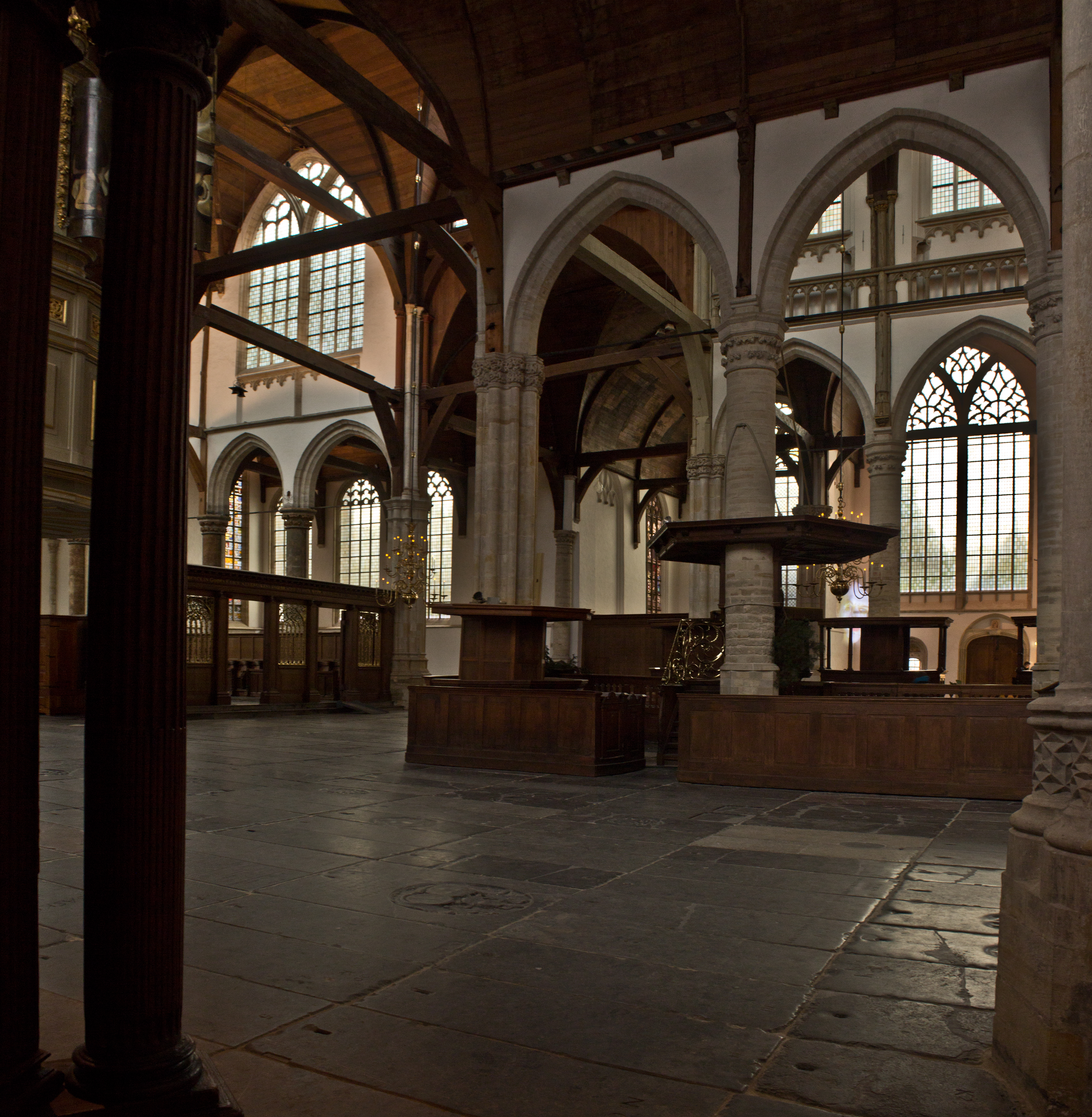 Amsterdam: Interieur van de Oude Kerk